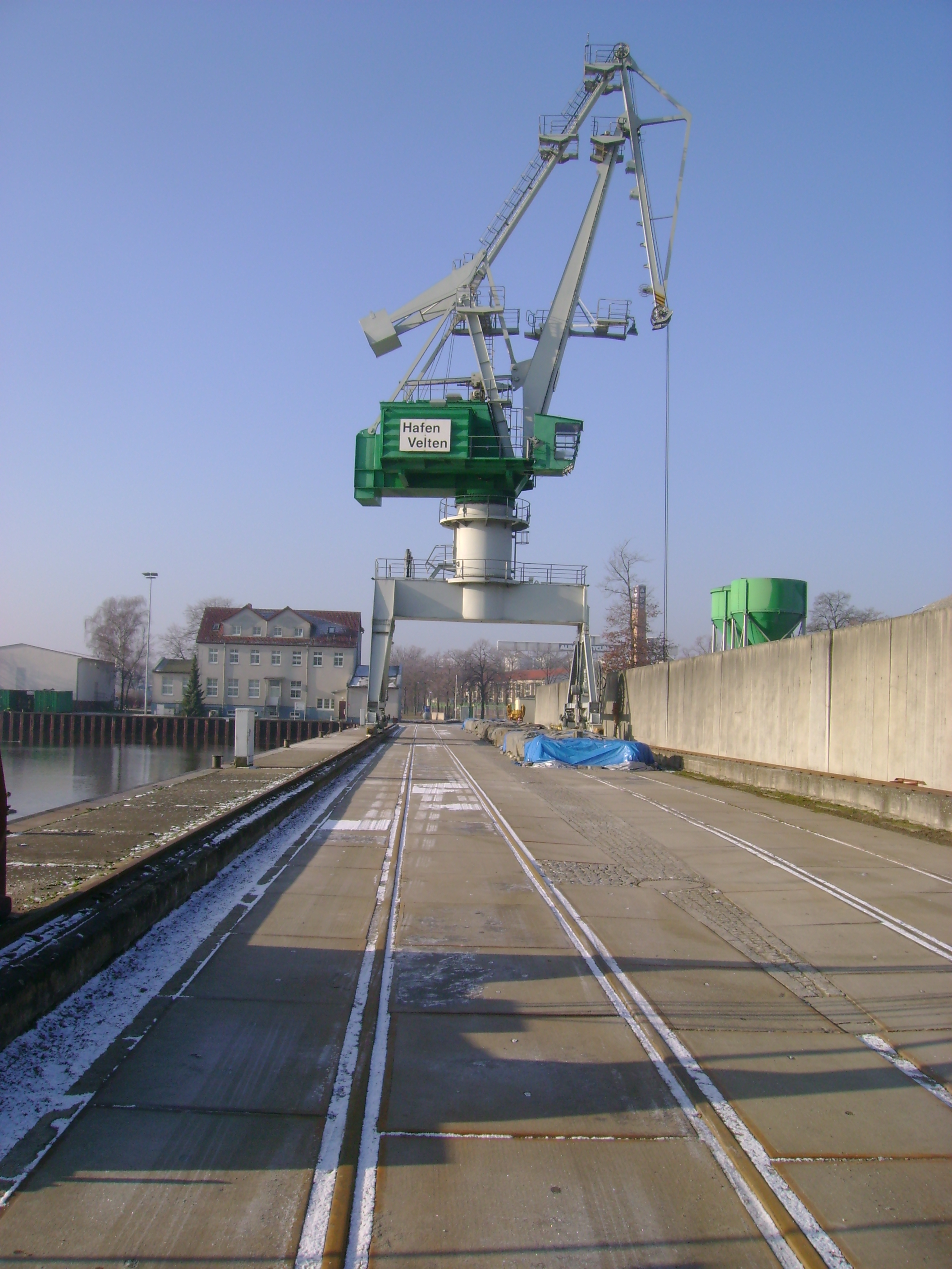 Hafen Velten, Nordkai, Januar 2011